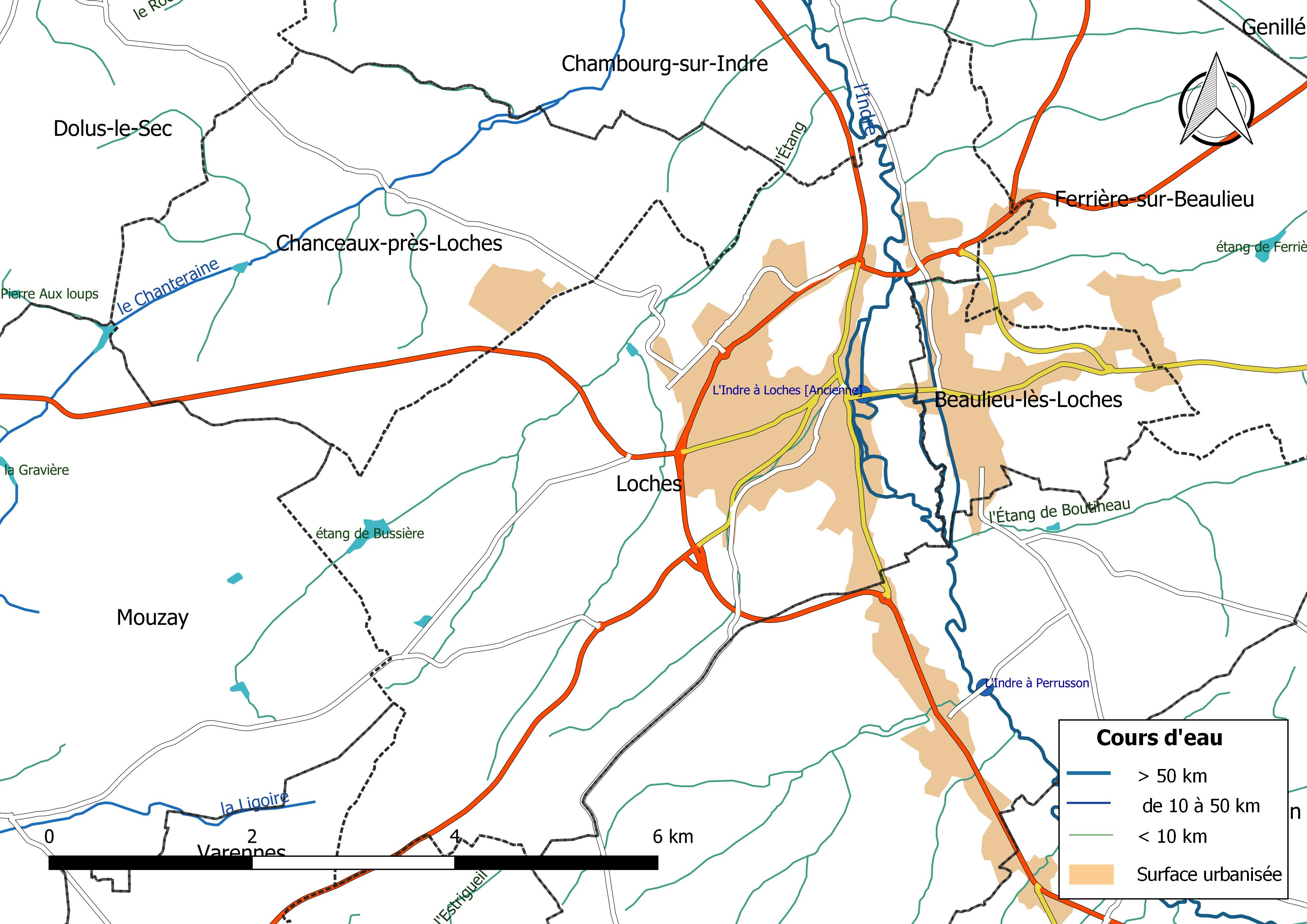 Carte du réseau hydrographique de la commune de Loches (France).